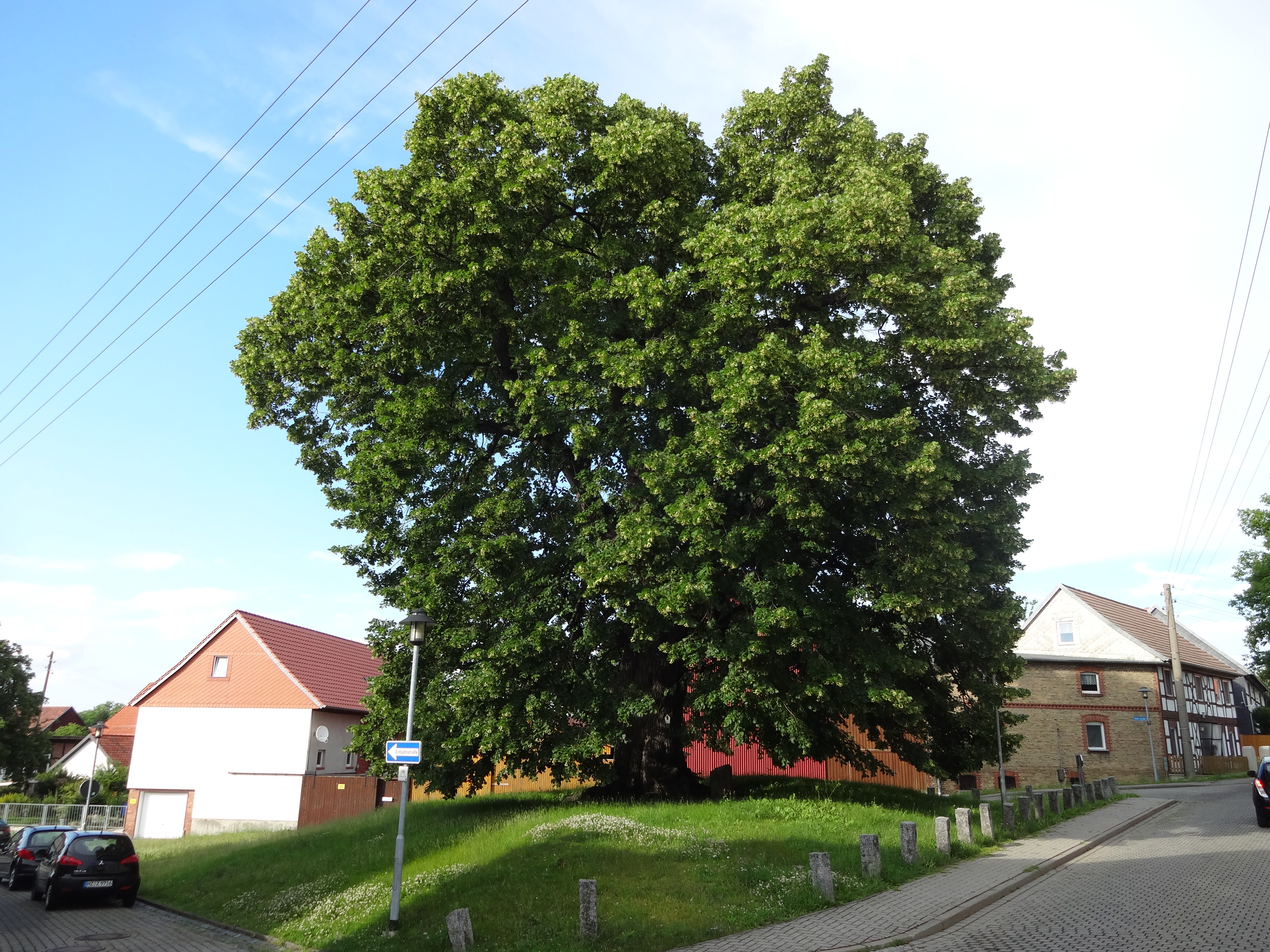 Krönungslinde in Silstedt, Naturdenkmal